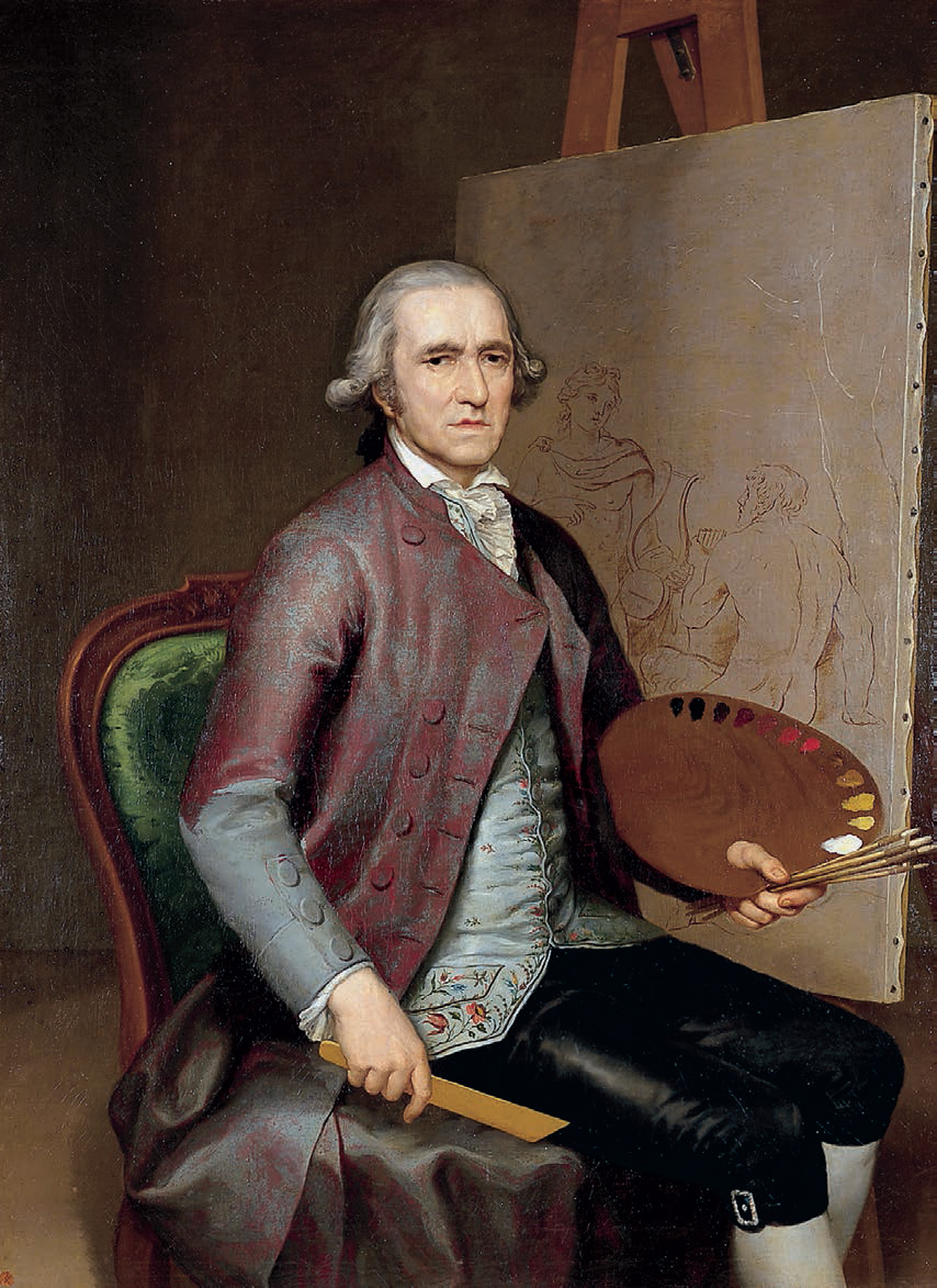 El lienzo, que es un autorretrato de Francisco Bayeu (1734-1795), fue ejecutado por el pintor hacia el año 1792.